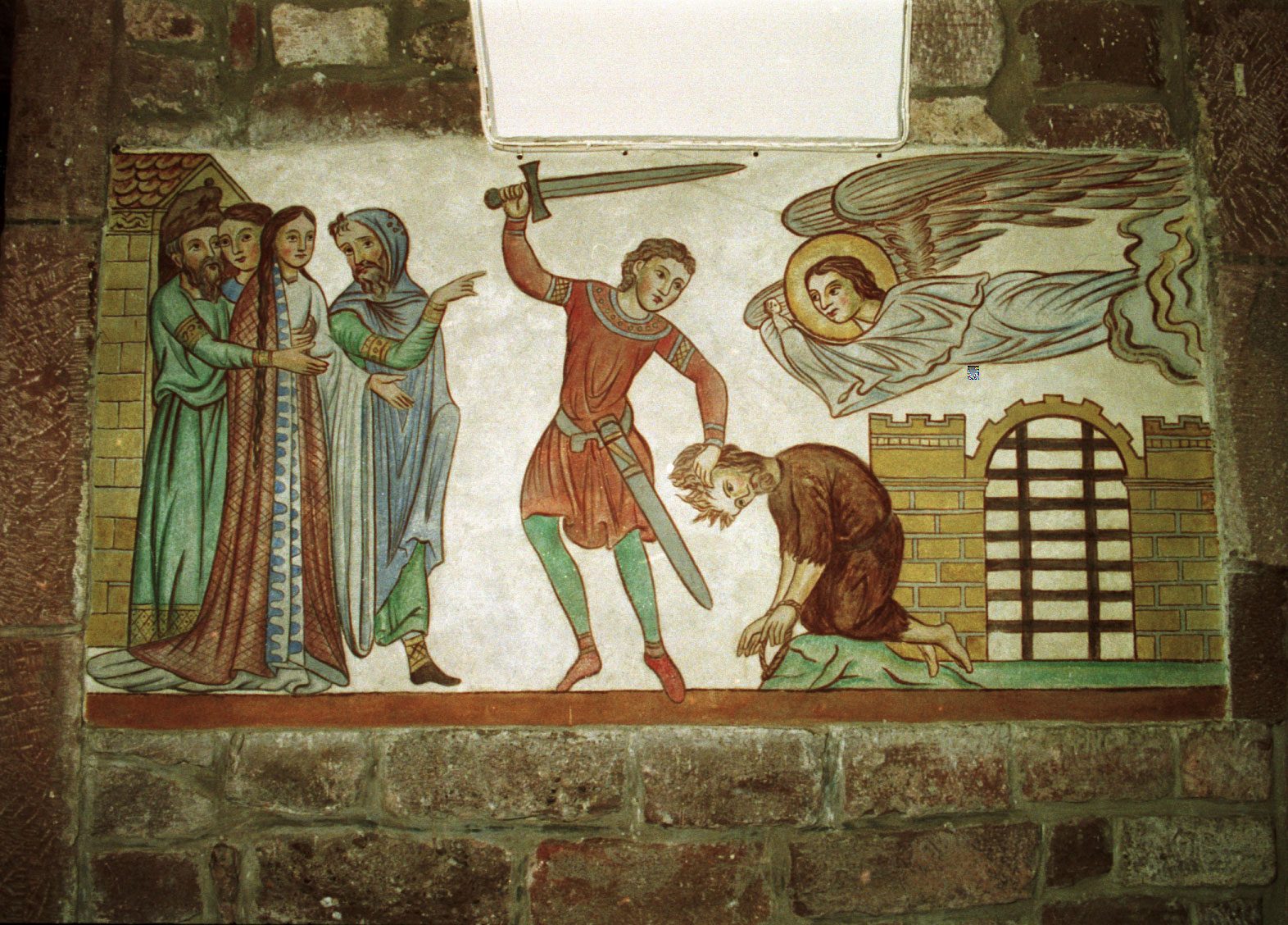 Wandbild von der Enthauptung Johannes